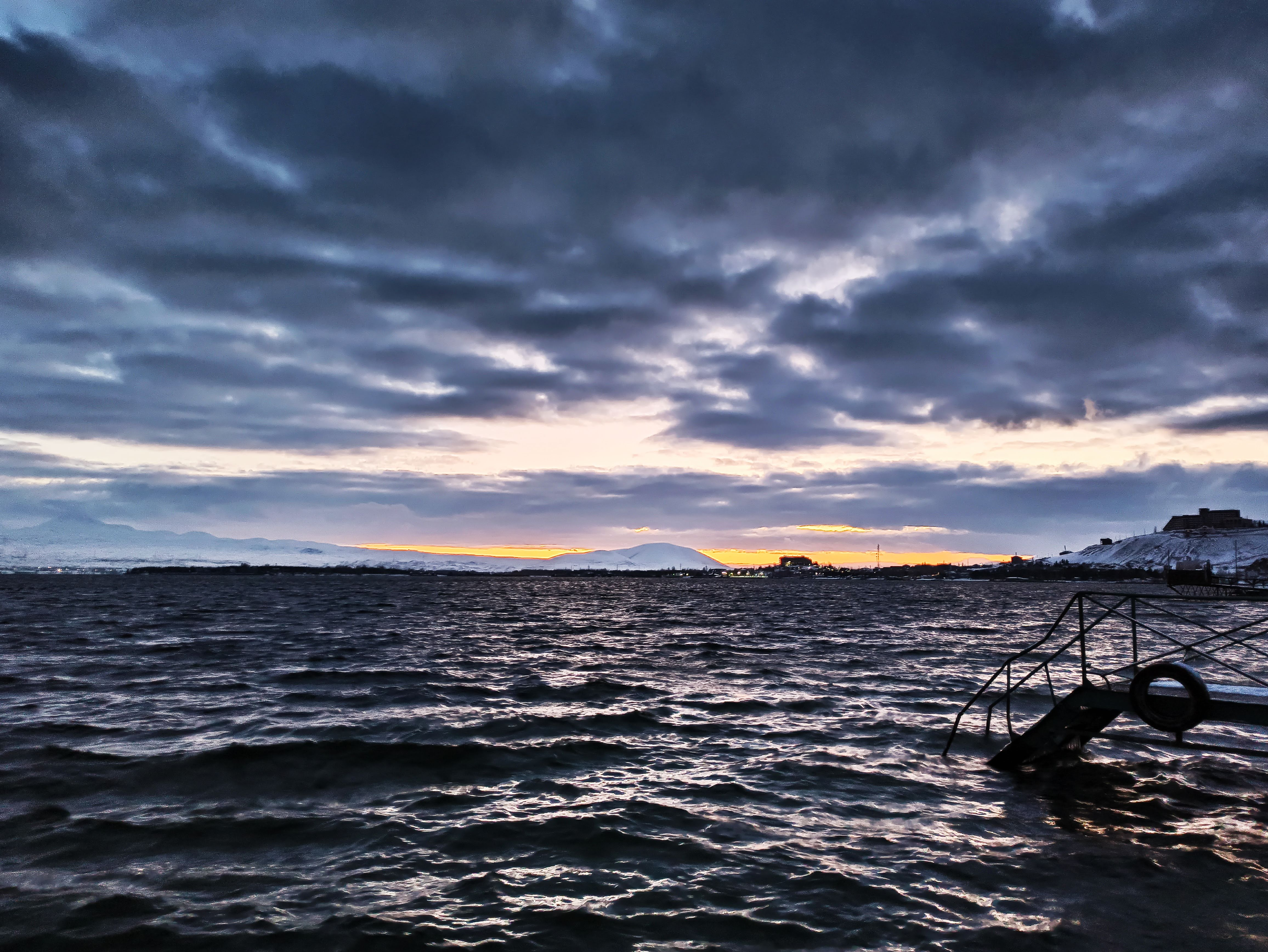 Սևանա լիճը ձմռանը, տեսարան թերակղզուց